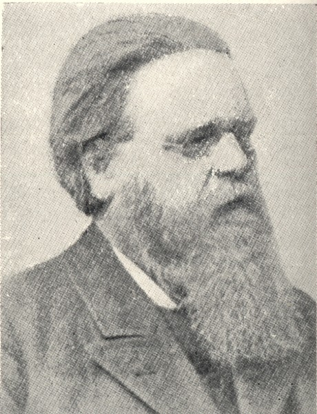 Tohtori Aksel August Granfelt